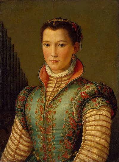 Портрет Леоноры Альварес де Толедо и Колонна (1553 - 1576) кисти Алессандро Аллори.